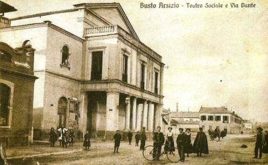 Il Teatro Soiale di Busto Arsizio in uno scatto d'epoca.